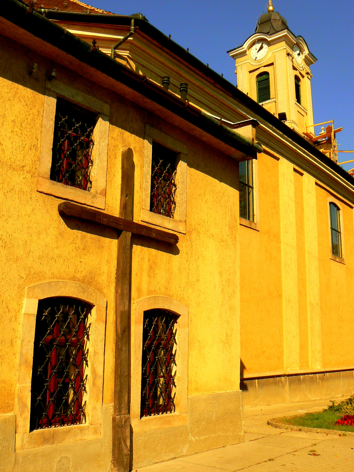 Római katolikus templom (Solymár, Templom tér)